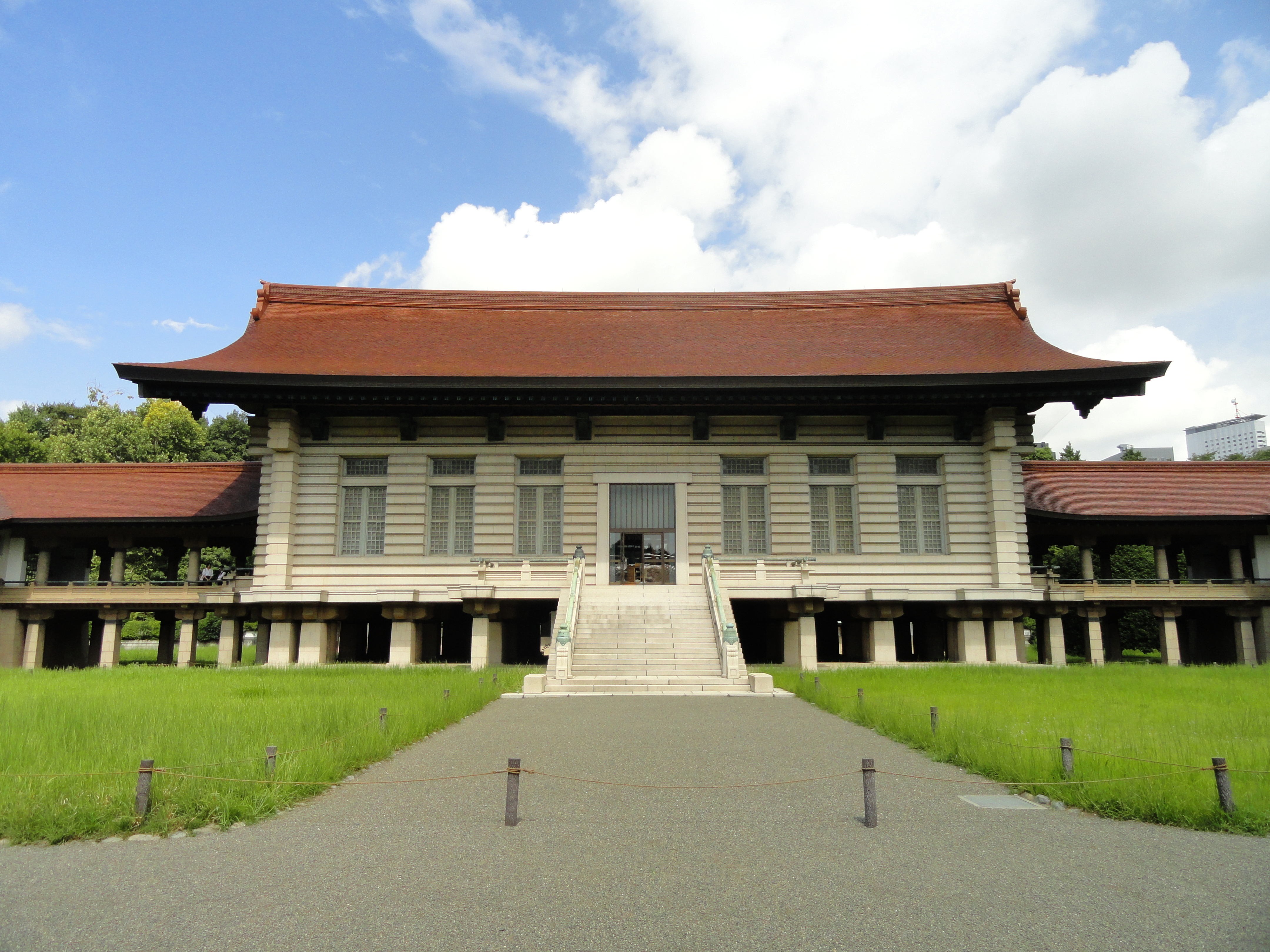 Meiji Shrine Treasure Museum, Shinjuku, Tokyo, Japan.